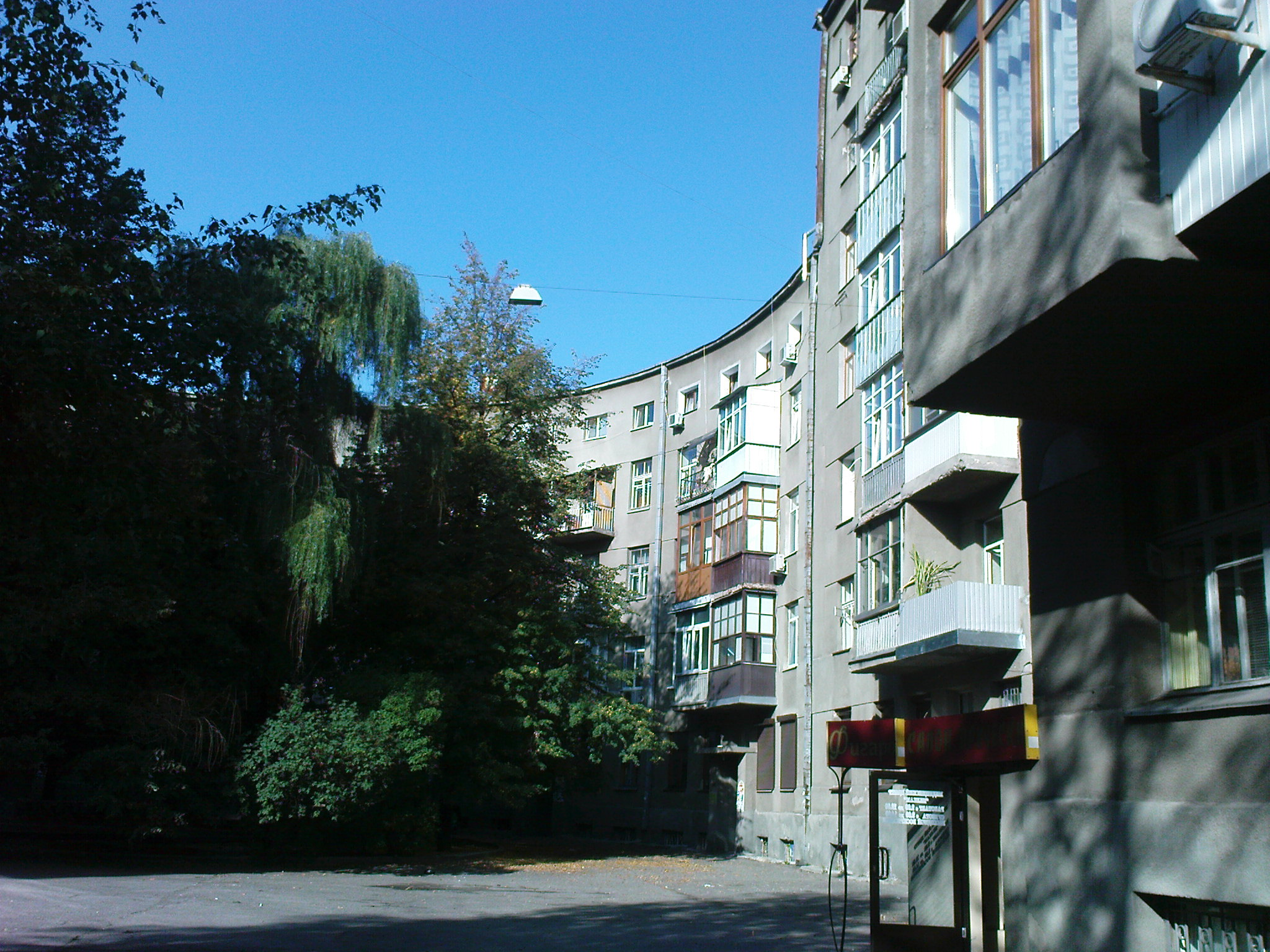 Україна, Харків, вул. Гіршмана, 17